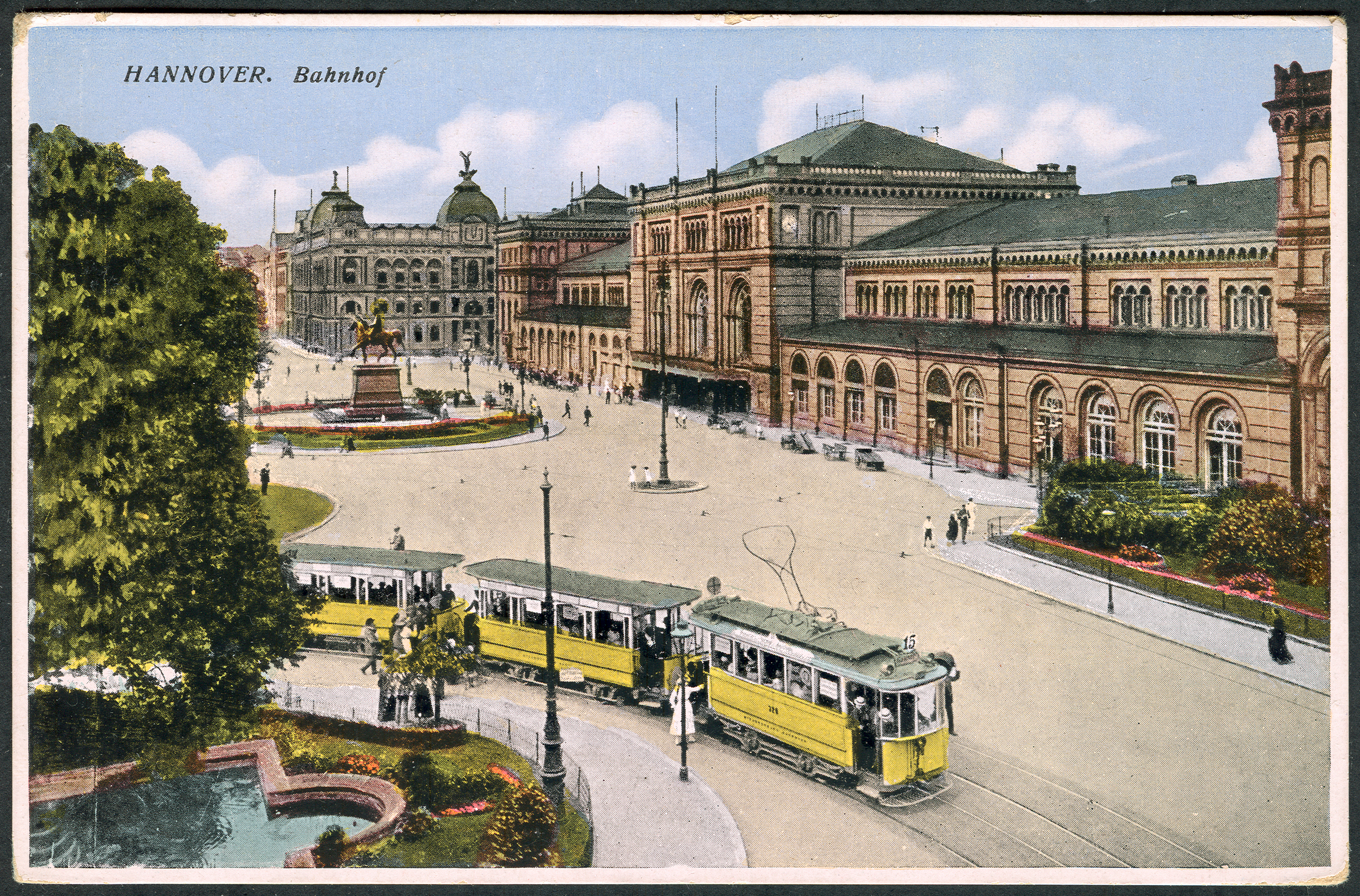 Fortlaufend nummerierte, kolorierte Ansichtskarte No. 34002 aus dem Verlag von Bartels & Kasten mit einem Blick über den belebten Ernst-August-Platz mit einem Drei-Wagen-Zug der Straßenbahn, dem Hauptbahnhof und dem ehemaligen (Reichs-)Hauptpostamt, anstelle dessen sich heute am Schnittpunkt der Lister Meile und der Kurt-Schumacher-Straße sich später die Ernst-August-Galerie erheben wird ...